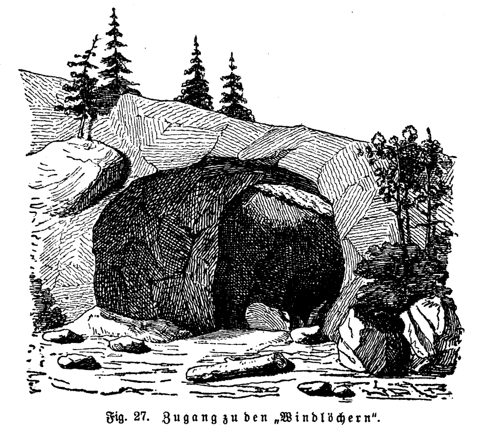 Skizze von Eberhard Fugger zu den Windlöchern, eines Höhlensystems am Unterberg, Österreich